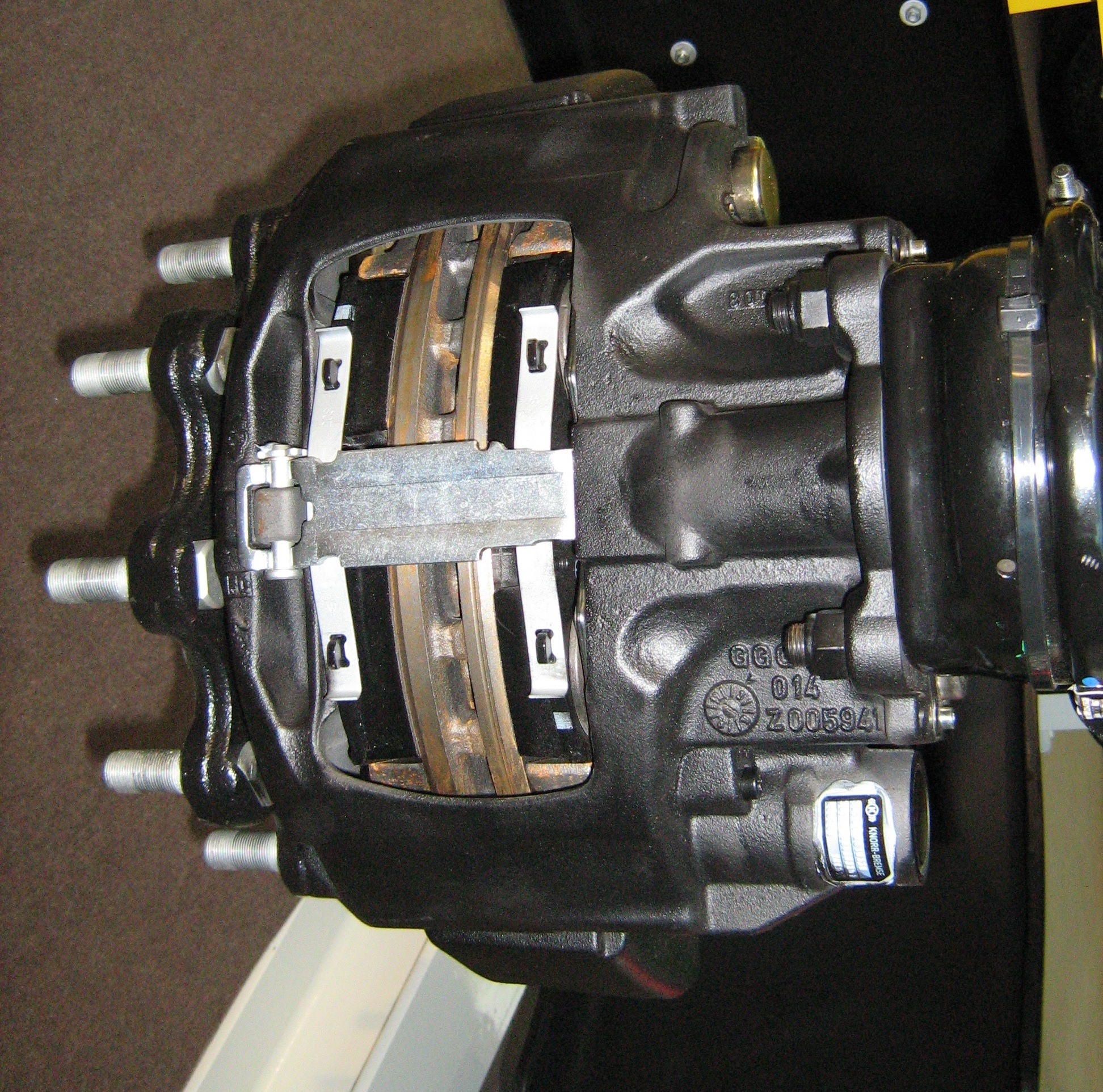 LKW-Scheibenbremse an der LKW-Achse